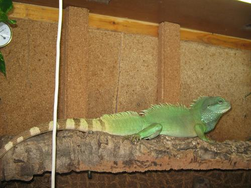 männliche Grüne Wasseragame (Physignathus cocincinus) Hanno auf Korkplatz